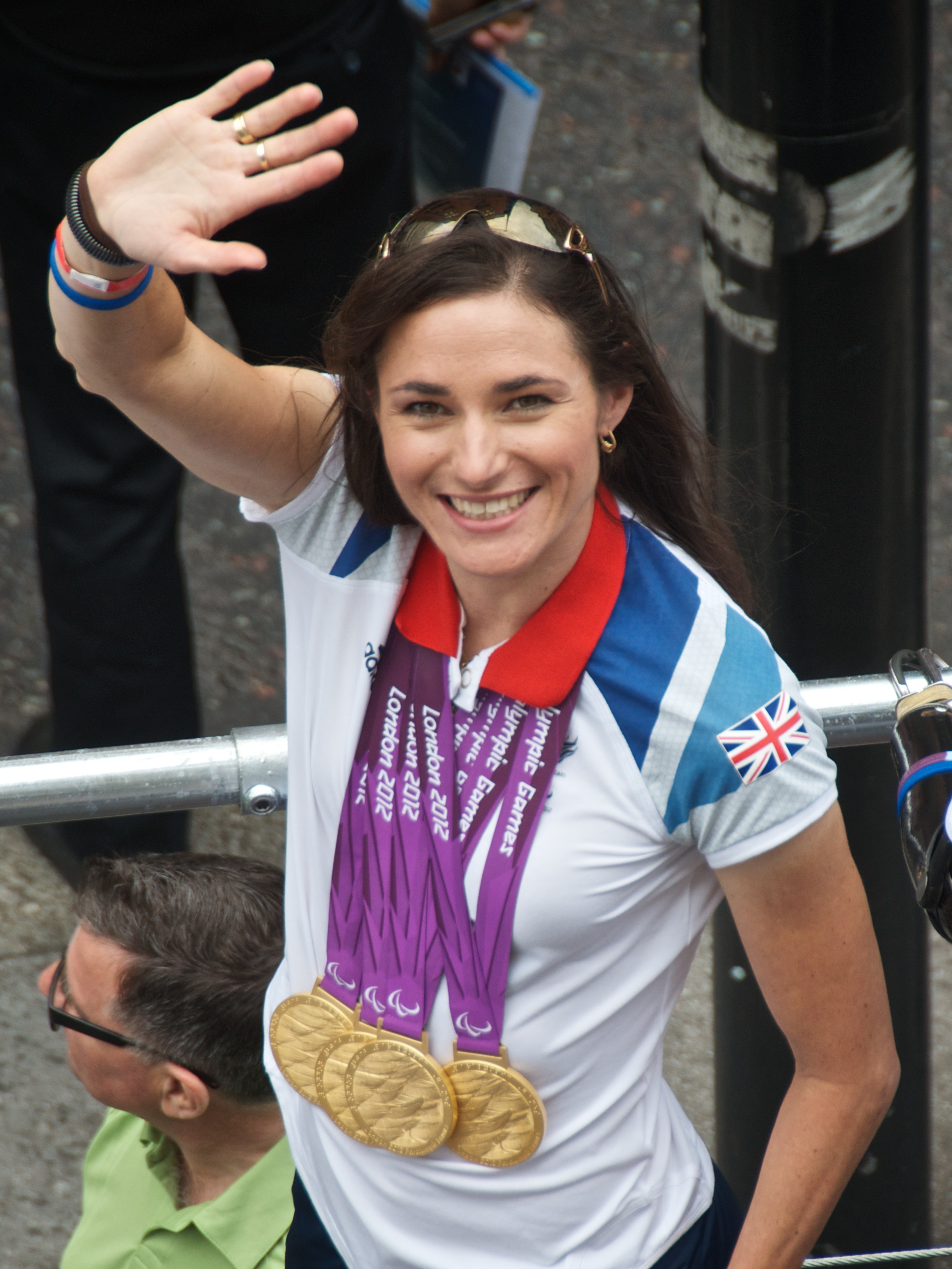 Cycling